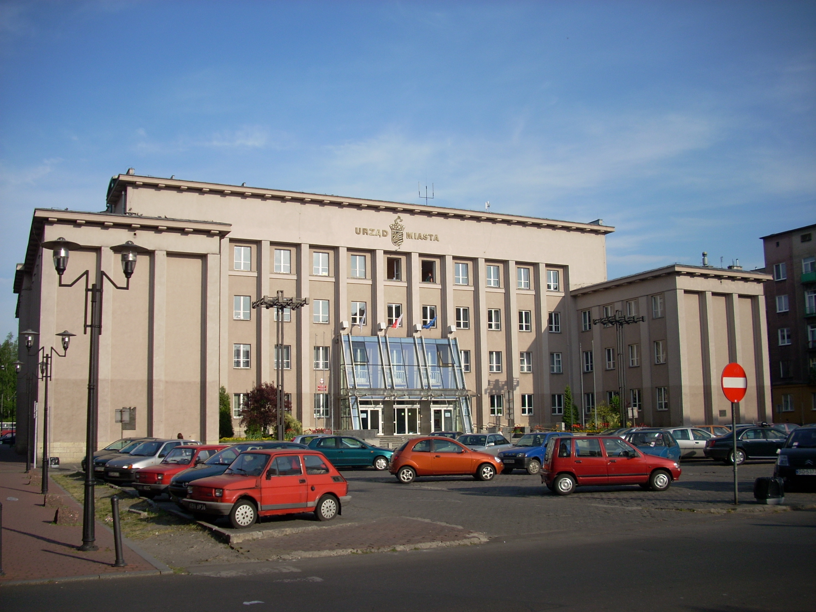 Urząd Miasta w Sosnowcu. Siedziba Rady Miejskiej.